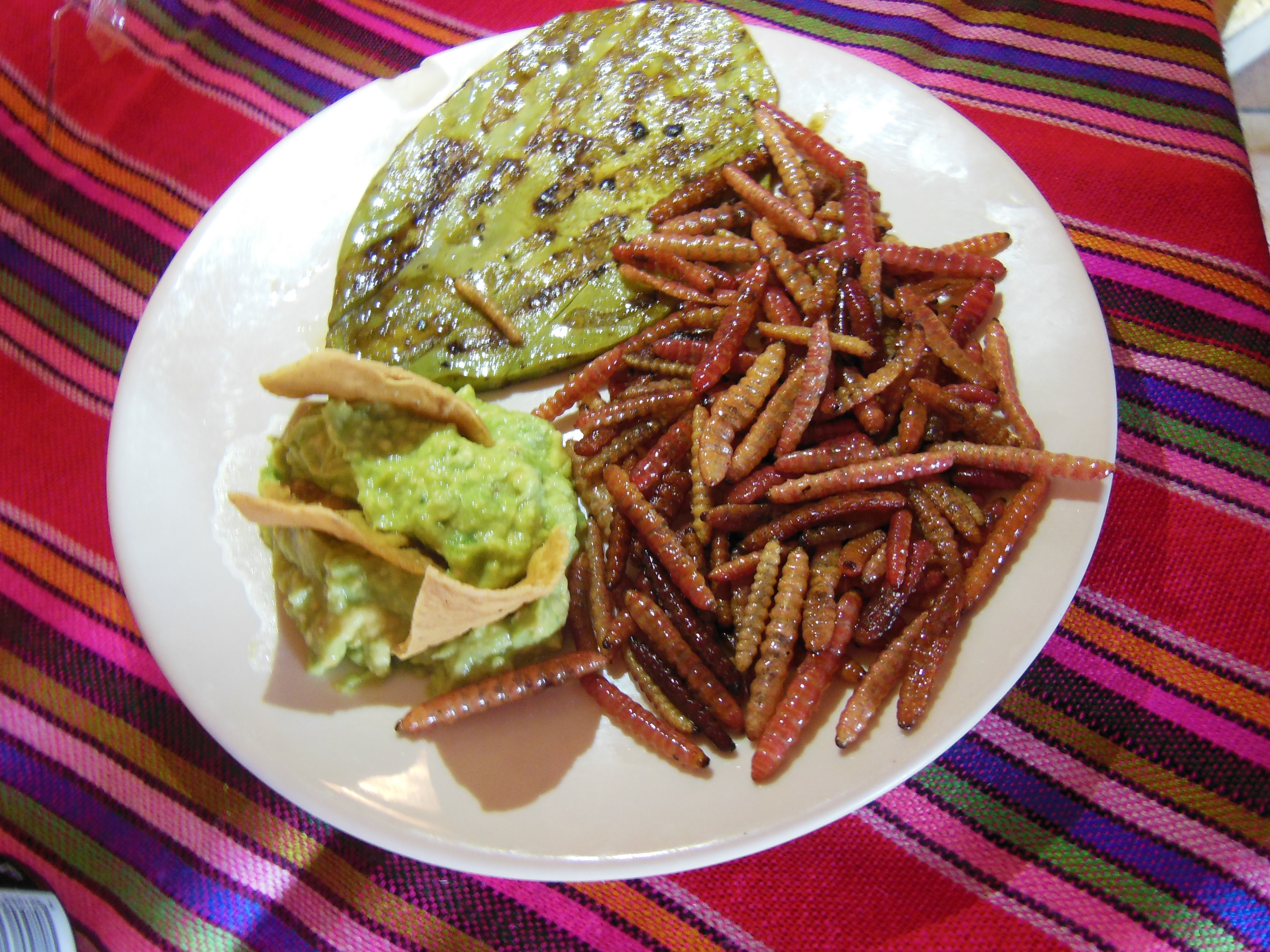 Comida de gusanos de maguey, muy ricos